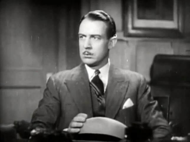 Lester Matthews. Bande-annonce du film "Le monstre de Londres" (1935)